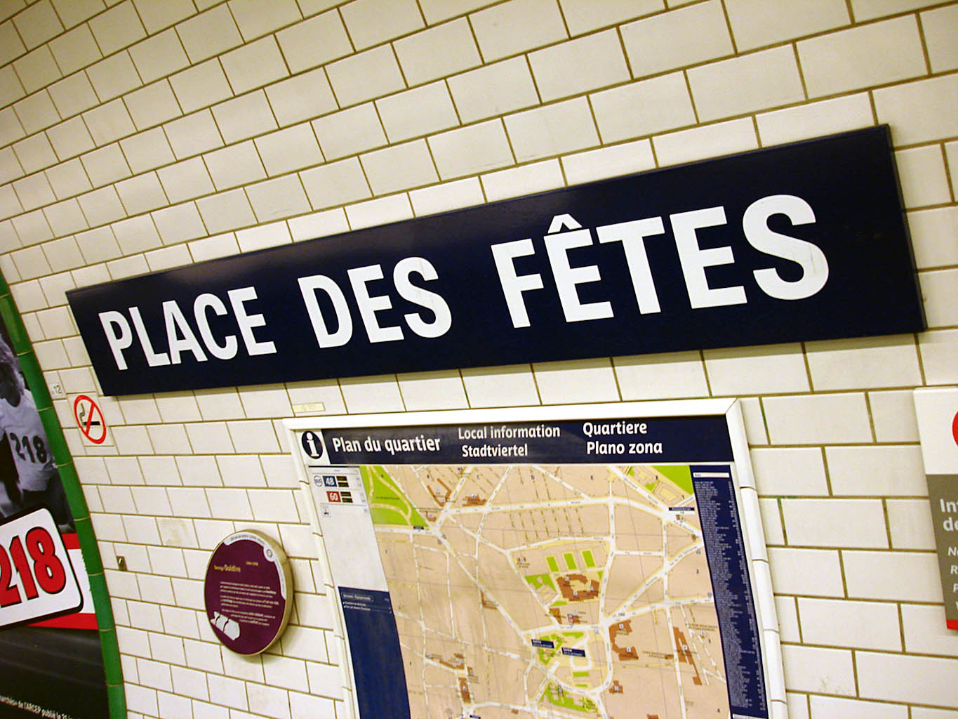 Station Place des Fêtes, de la ligne 11 du métro de Paris, France.